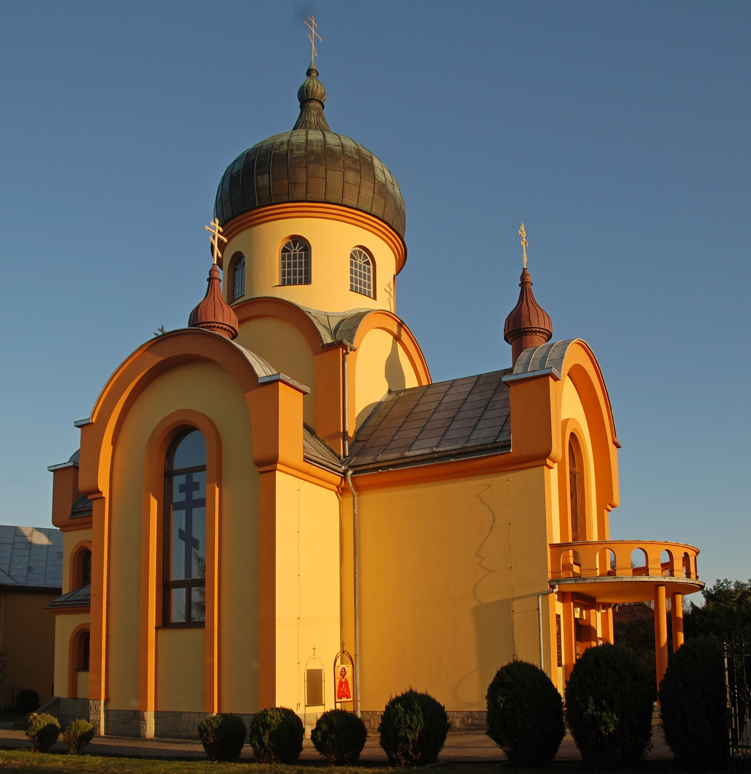 miasto Gorlice